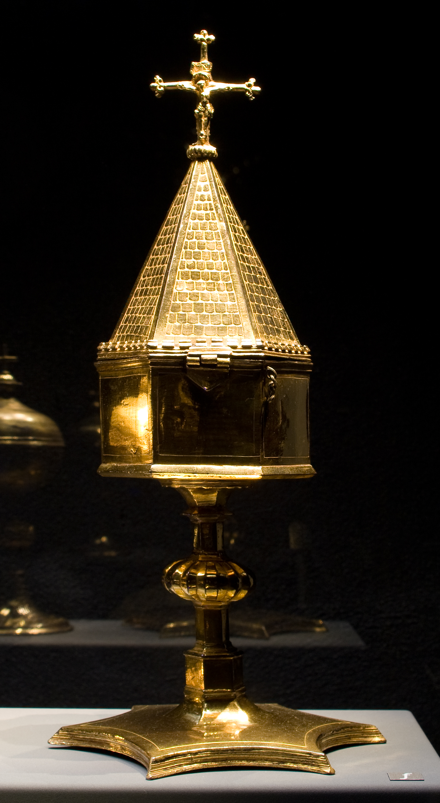 Zeskantige ciborie, Rijnland, 14e eeuw